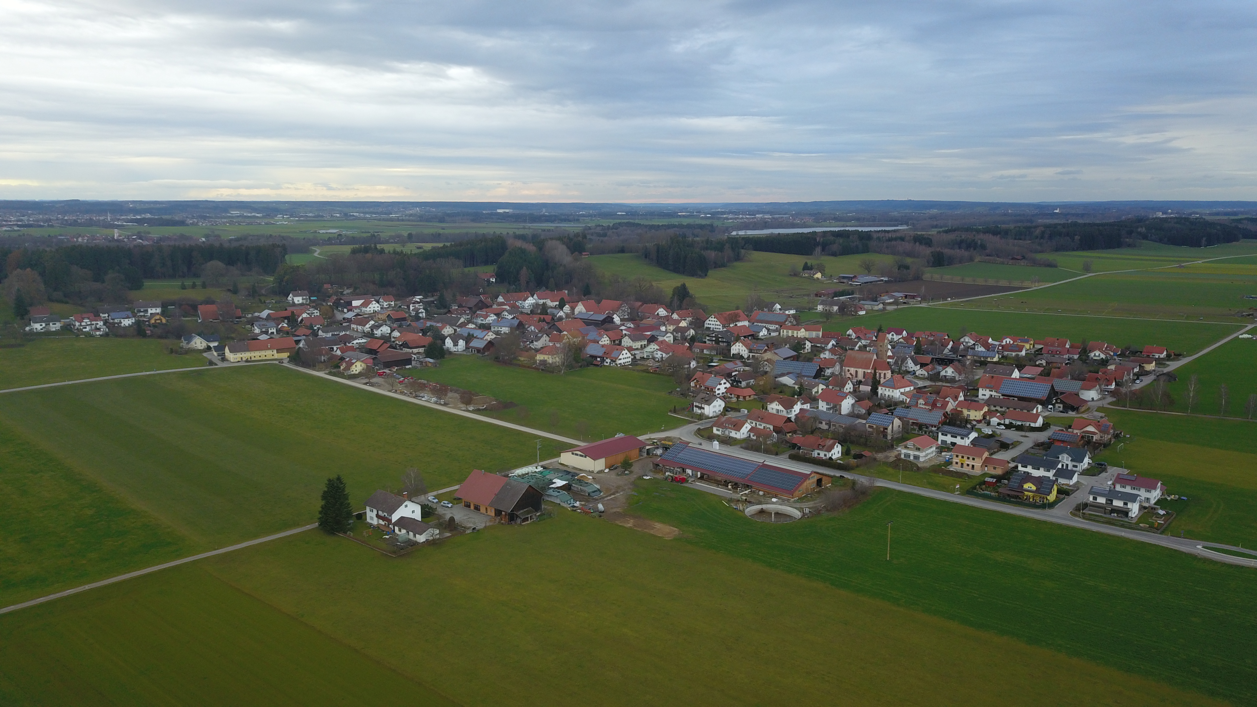 Weicht, Gemeinde Jengen